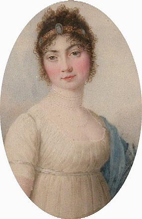 Erbprinzessin Therese von Thurn und Taxis (1773-1839)